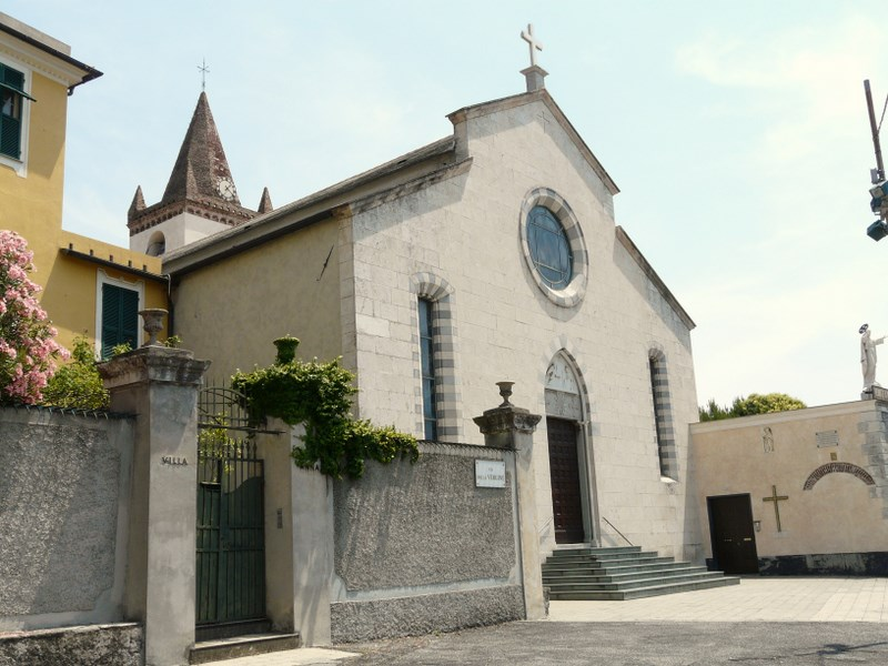 Chiesa della Santissima Annunziata di Sturla, Sturla, Genova, Liguria, Italia